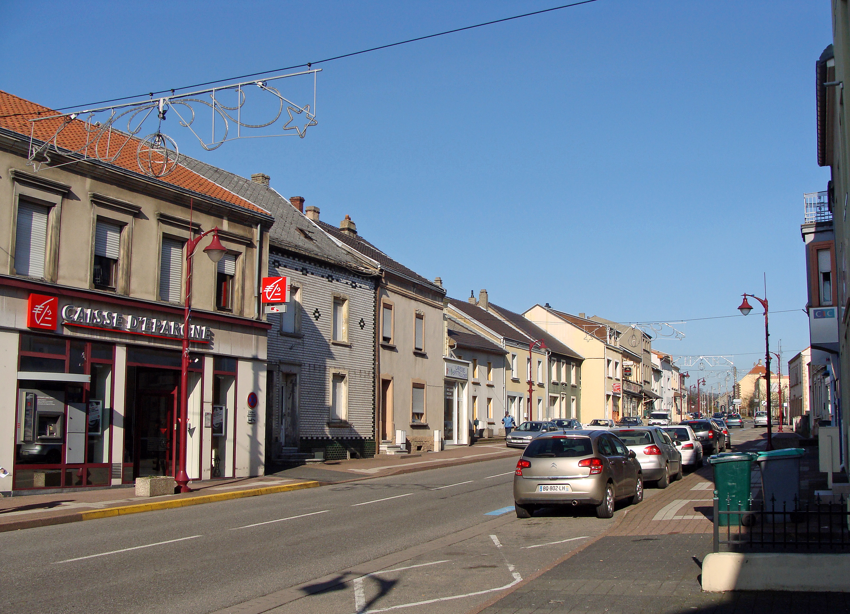 L'Hôpital (Moselle). Rue du maréchal Foch. Centre-ville.